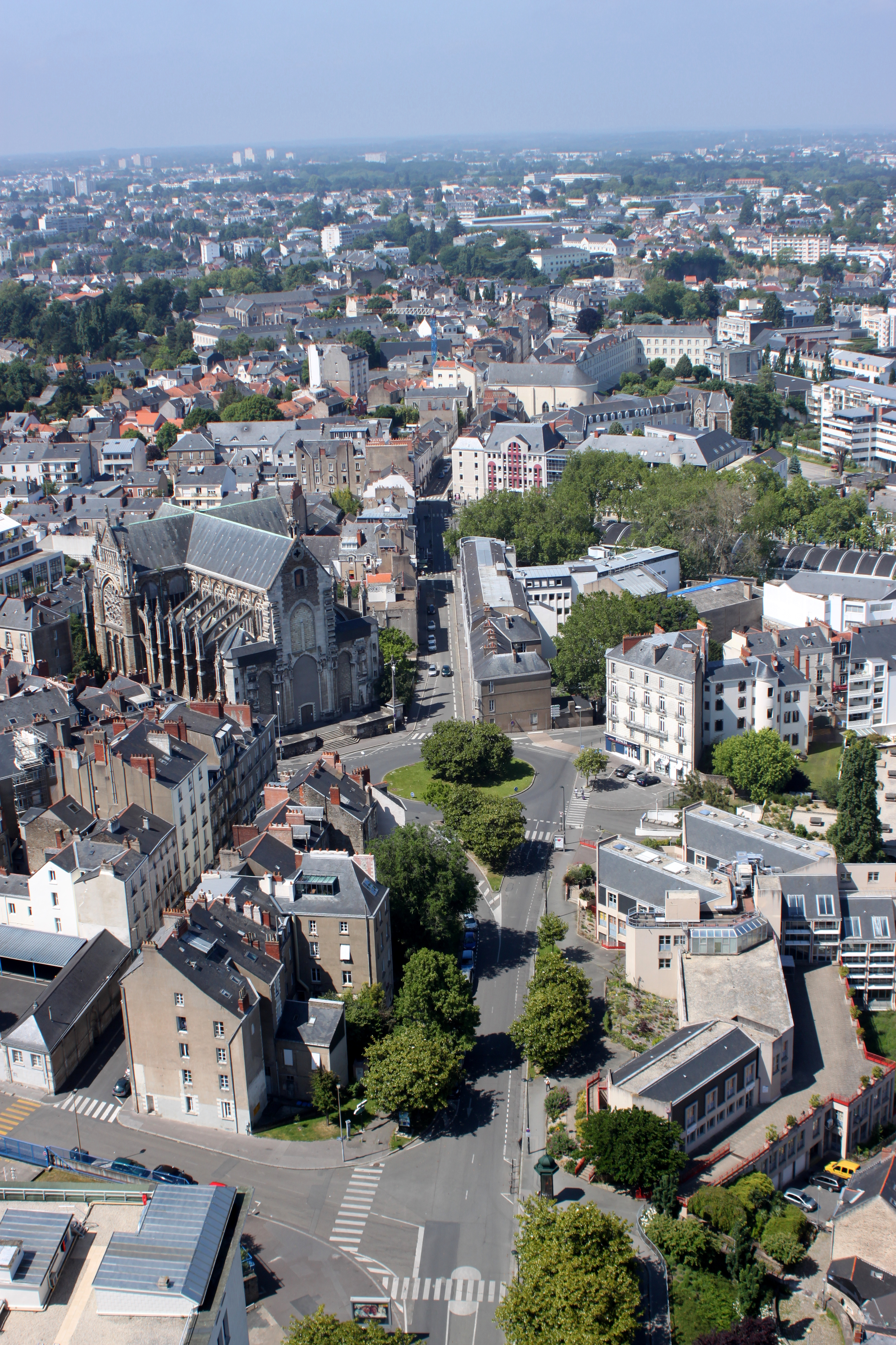 Place Saint-Similien (au centre), Fr-44-Nantes.